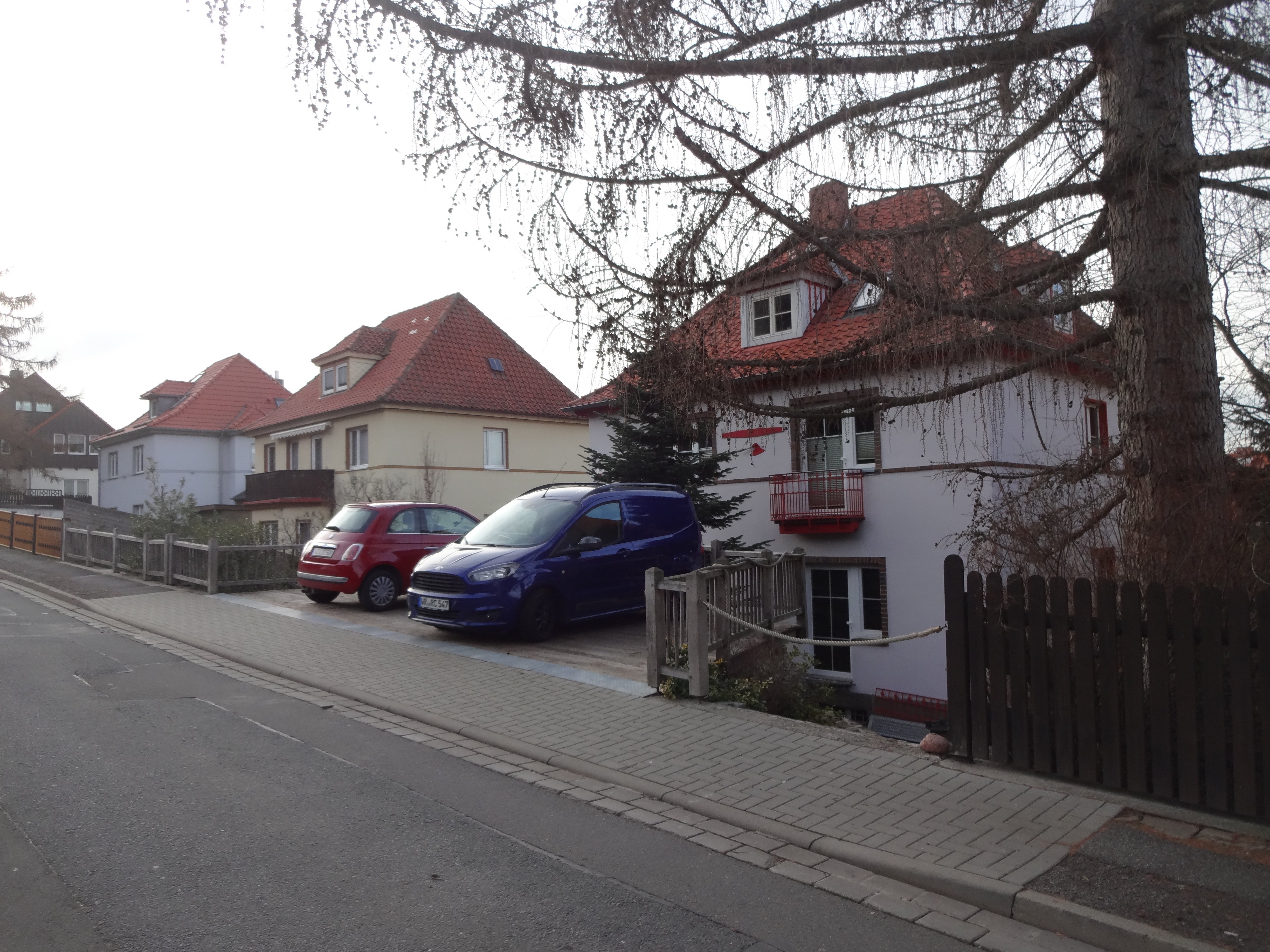 Wohnhaus der ehemals denkmalgeschützten Siedlung Kapitelsberg 37, 38 , 39, 40 in Wernigerode